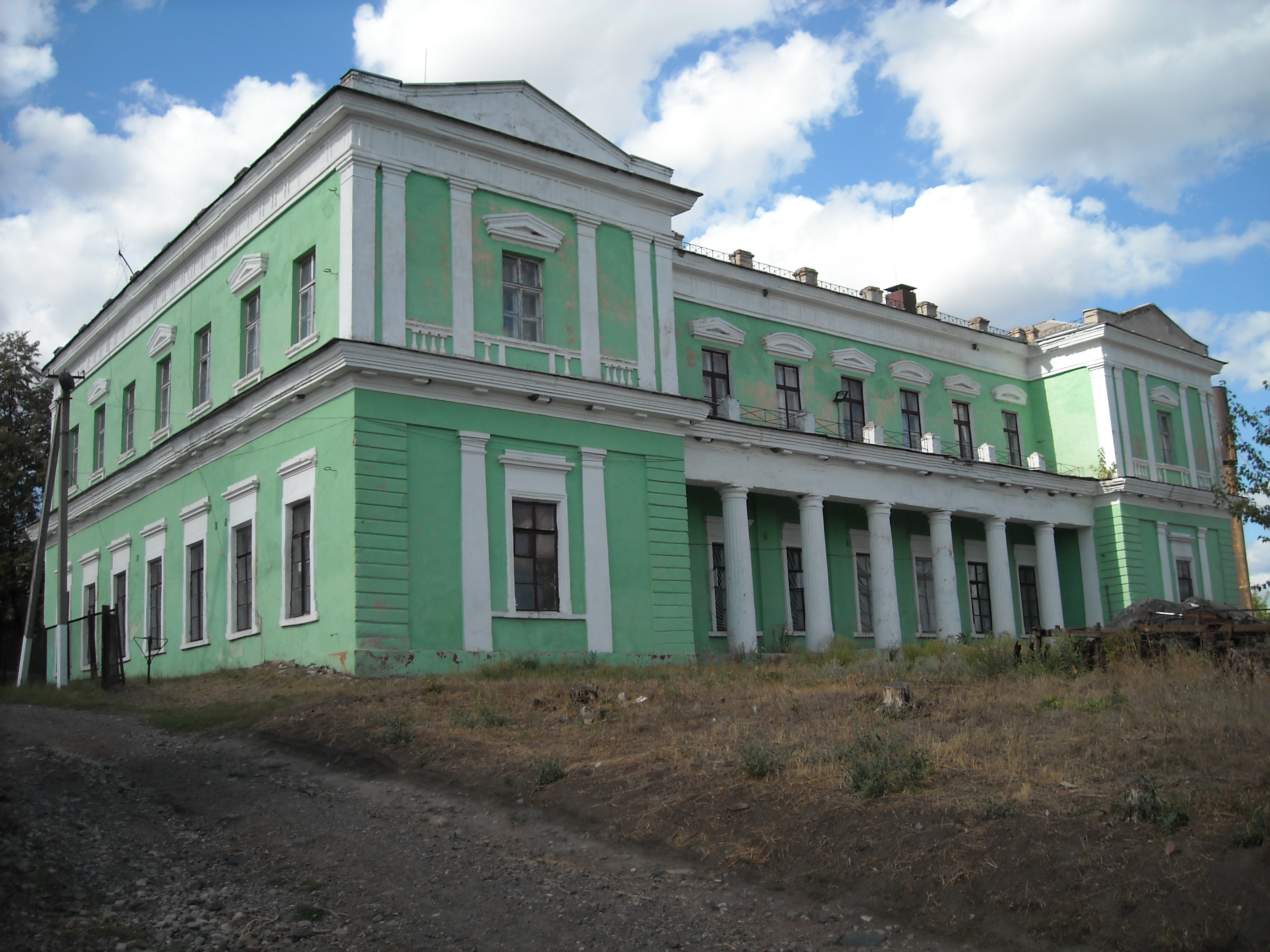 Україна. Нововодолазький район. Рокитне. Маєток Куликовських.